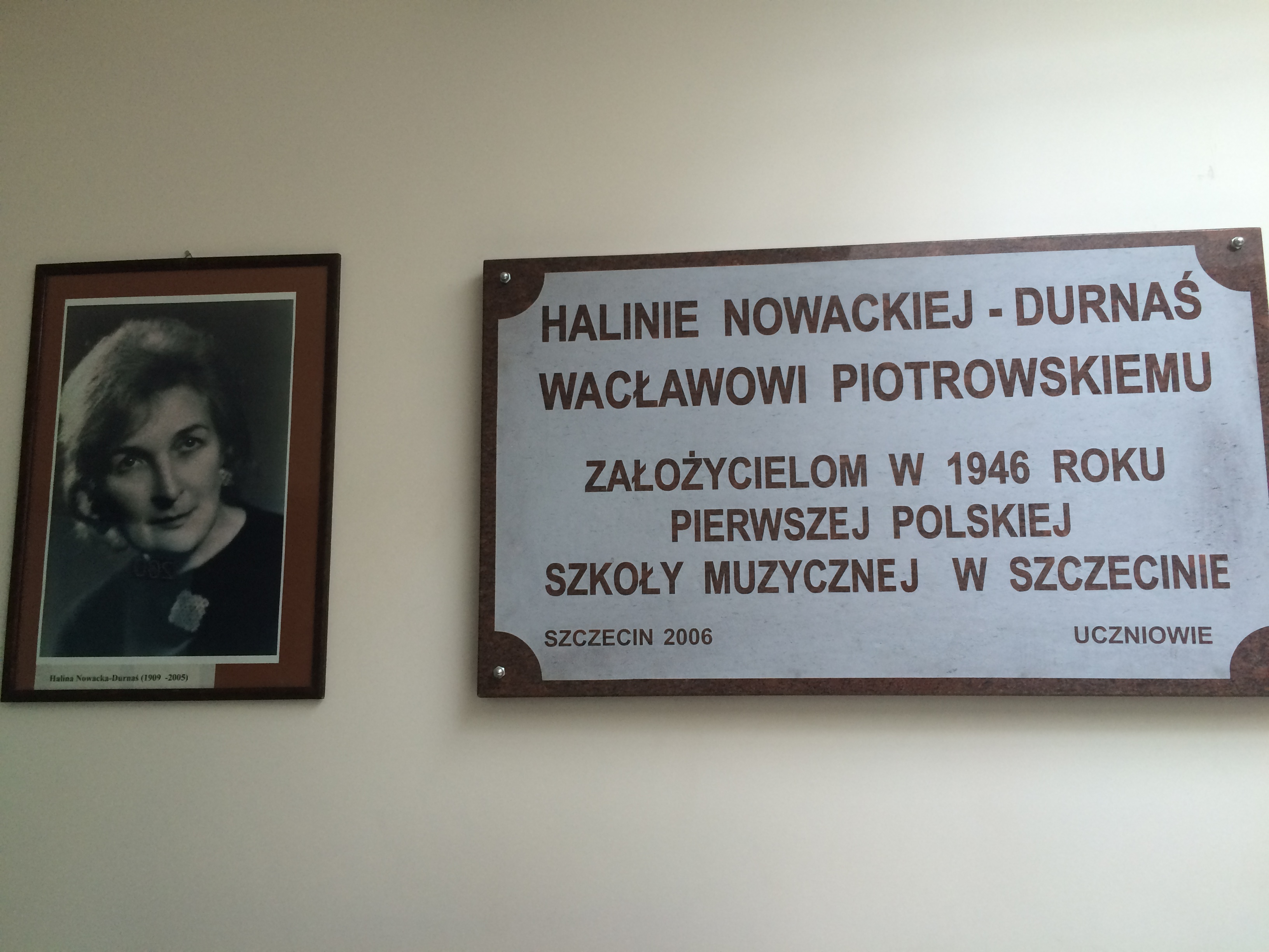 Tablica pamiątkowa ku czci pionierów szkolnictwa muzycznego w powojennym szczecinie: Halina Nowacka-Durnaś i Wacław Piotrowski